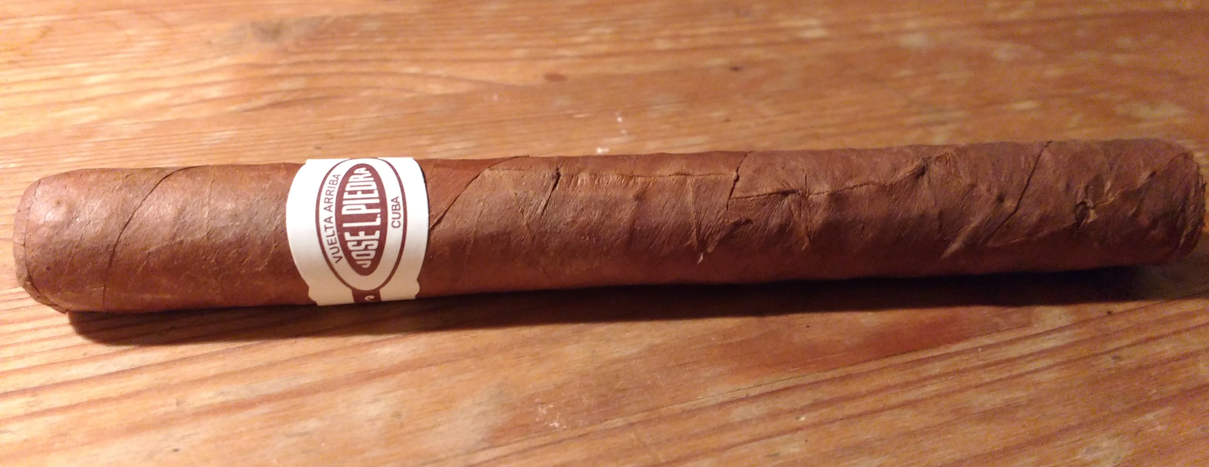 Cigar of the Brand "José l. Piedra"